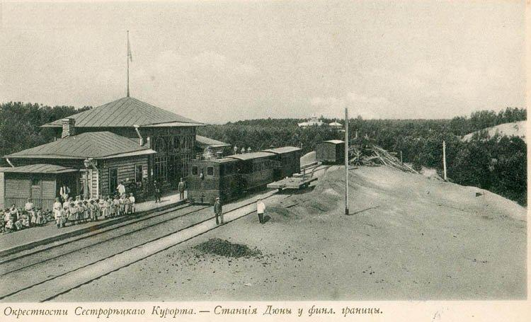 Железнодорожная станция Дюны на дореволюционной открытке